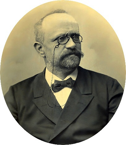 August Wieser, starosta Brna v letech 1894–1916